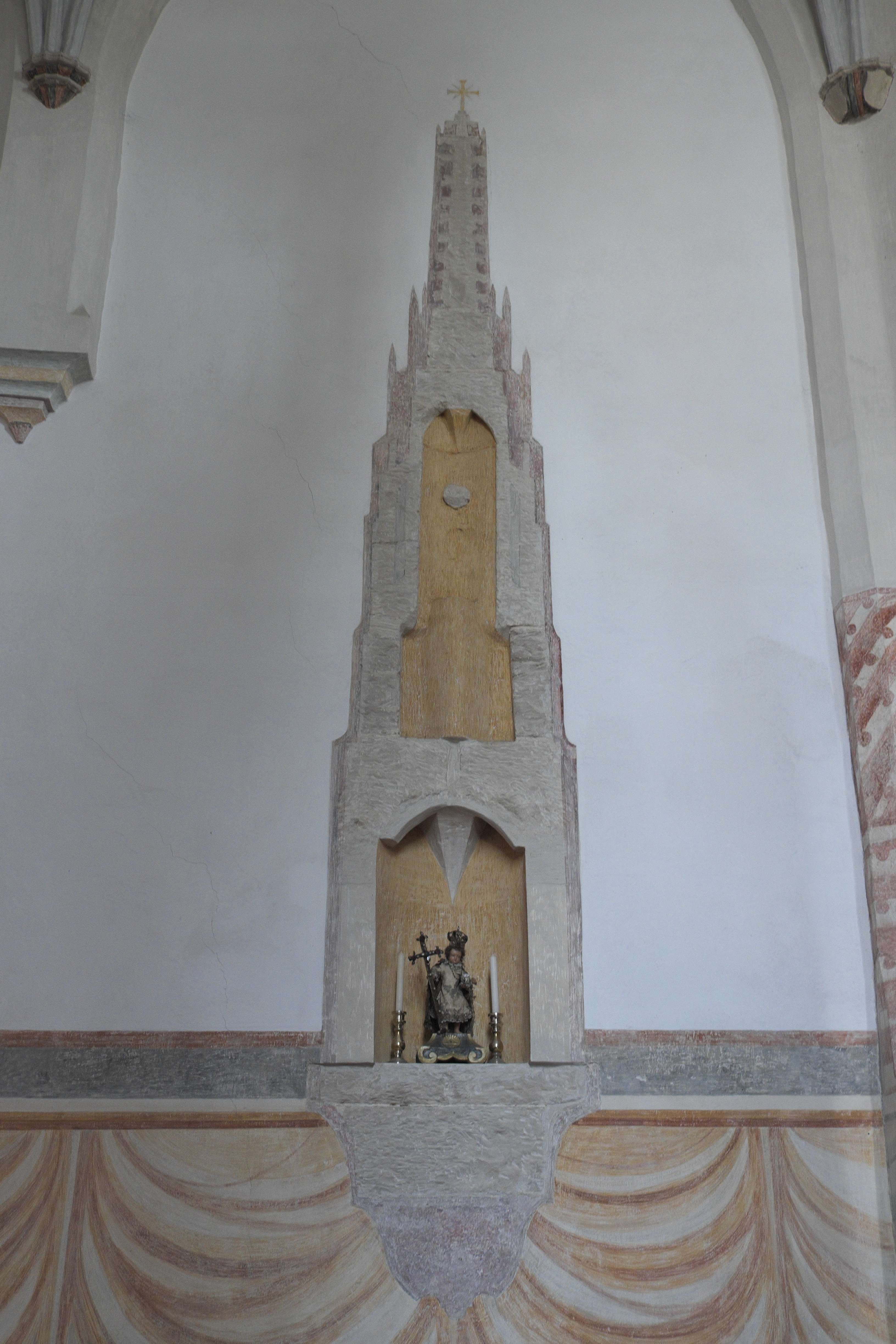 Katholische Filialkirche St. Remigius in Lappach (Sankt Wolfgang) im oberbayerischen Landkreis Erding (Bayern/Deutschland), Reste eines Sakramentshauses